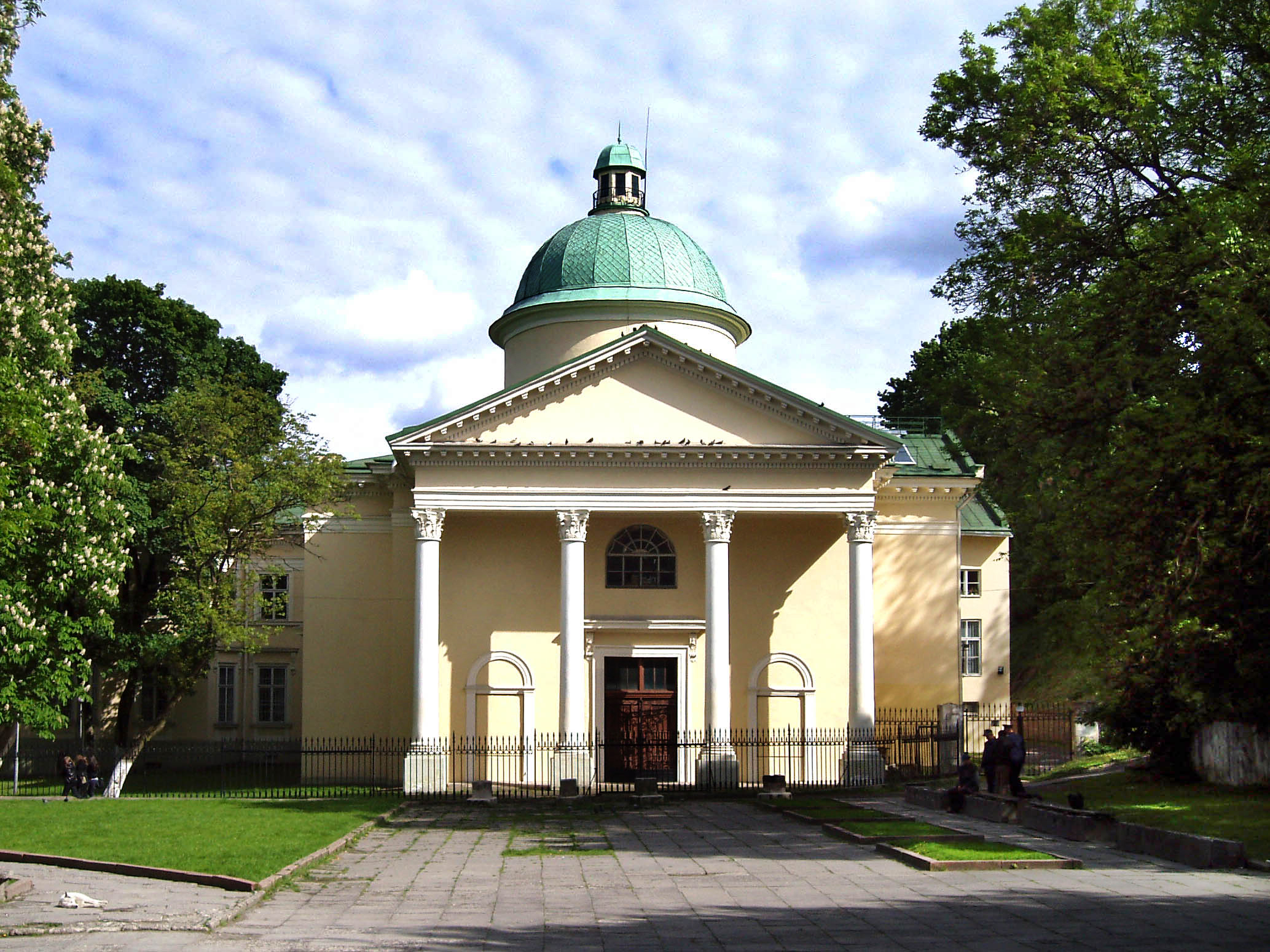 Бічний фасад наукової бібліотеки ім. Стефаника у Львові. Колишній костел при монастирі кармеліток взутих.